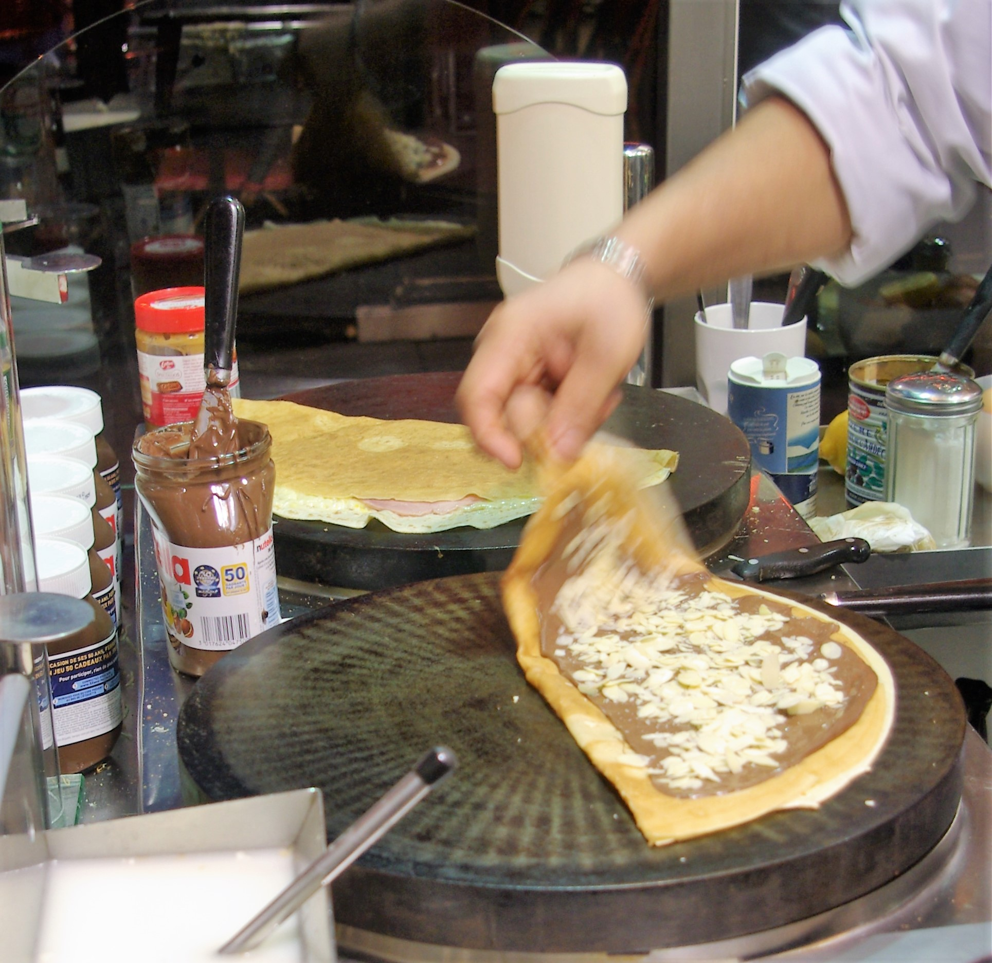 Zubereitung von Crêpes am Montparnasse in Paris